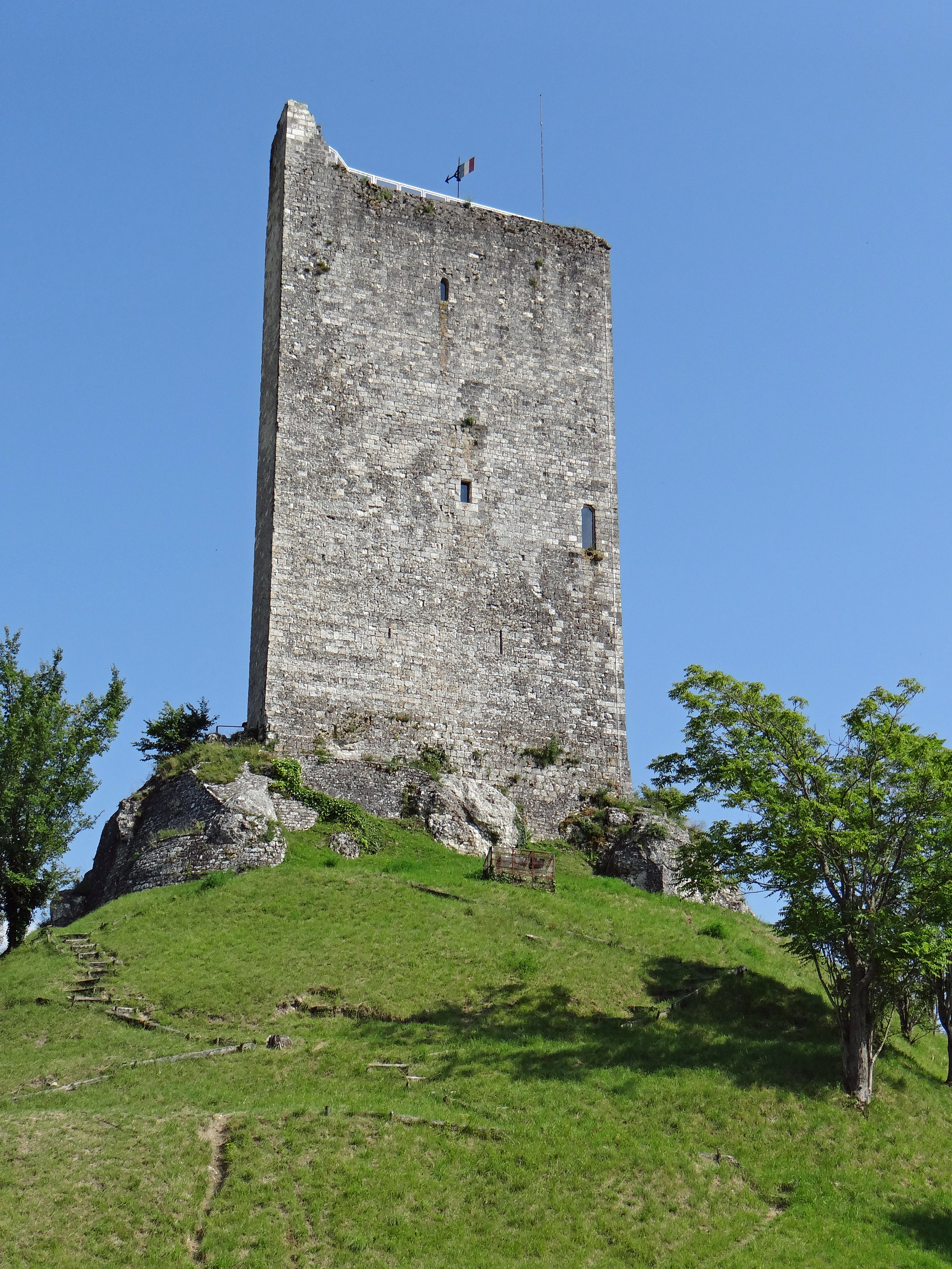 Tour de Montcuq